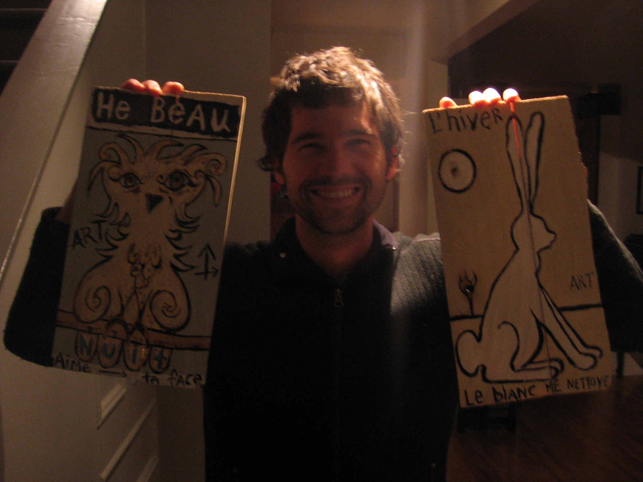 L'acteur, metteur en scène et homme de théâtre Maxime Denommée avec deux œuvres de sa collection privée - Création Art Nomade